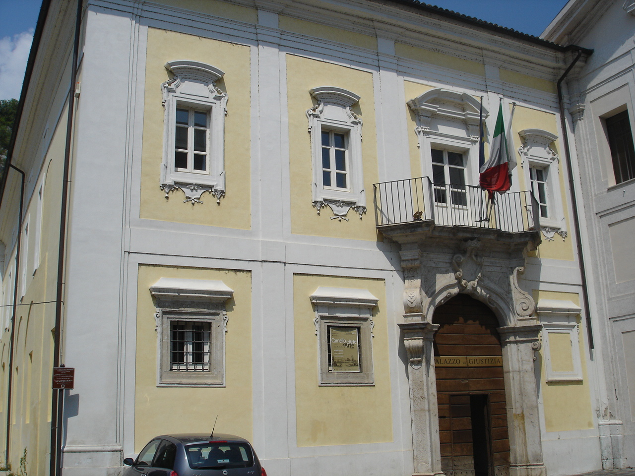 Palazzo di Giustizia di Sora, già sede della sottoprefettura del Circondario di Sora in provincia di Caserta